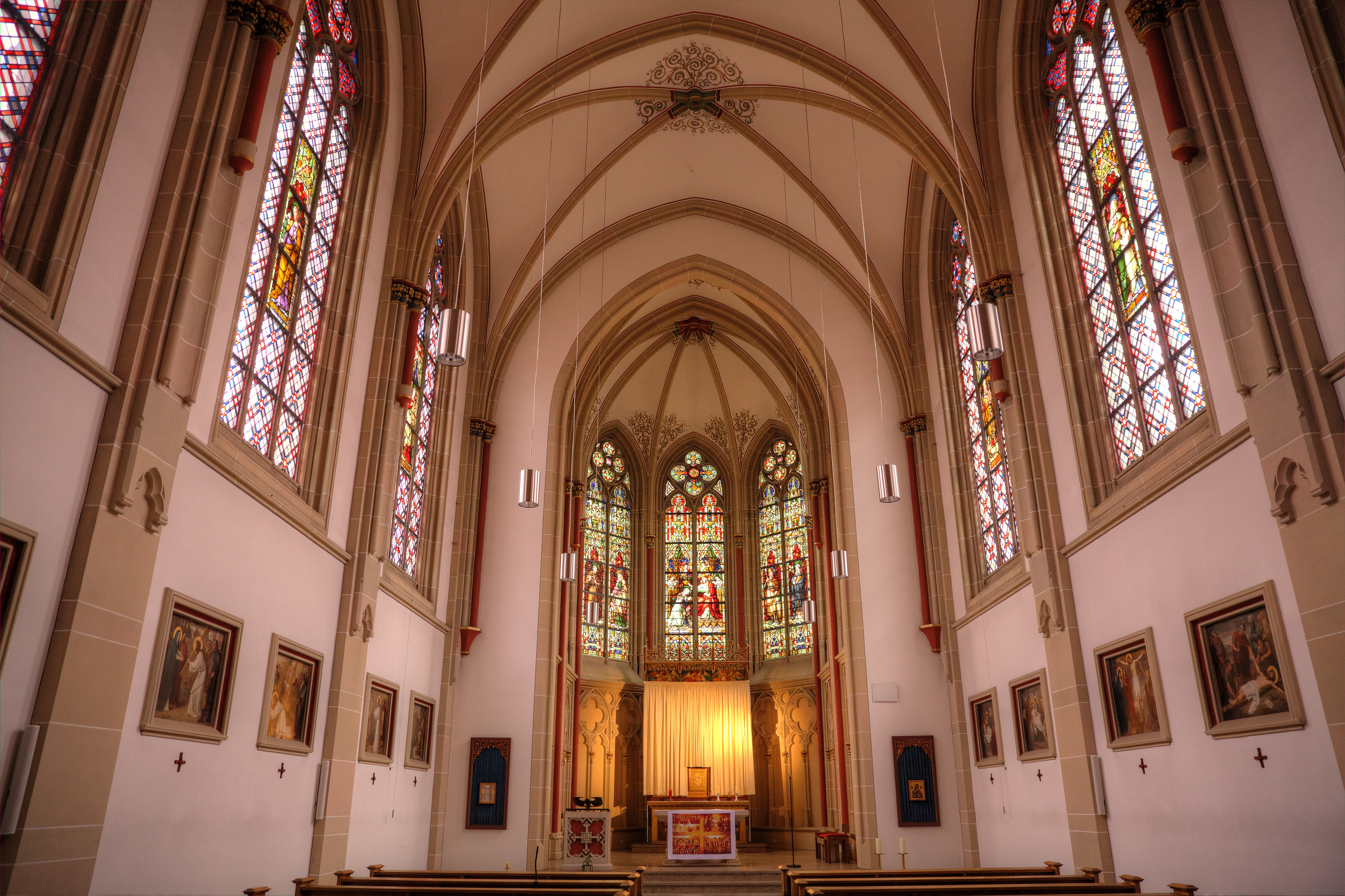 Kapelle Stift Tilbeck, Innenraum